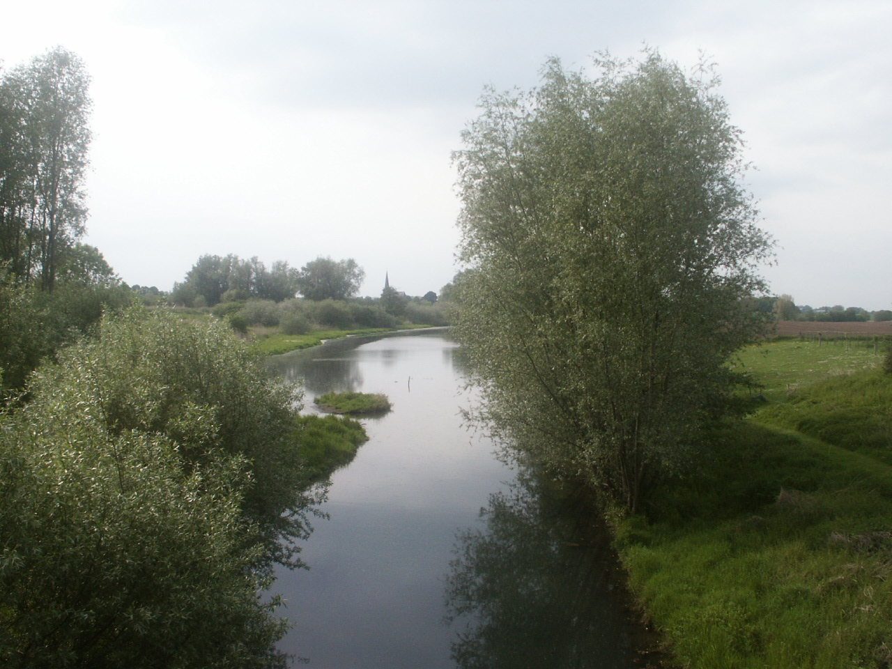 Kalflak, Abschnitt Wissel-Till